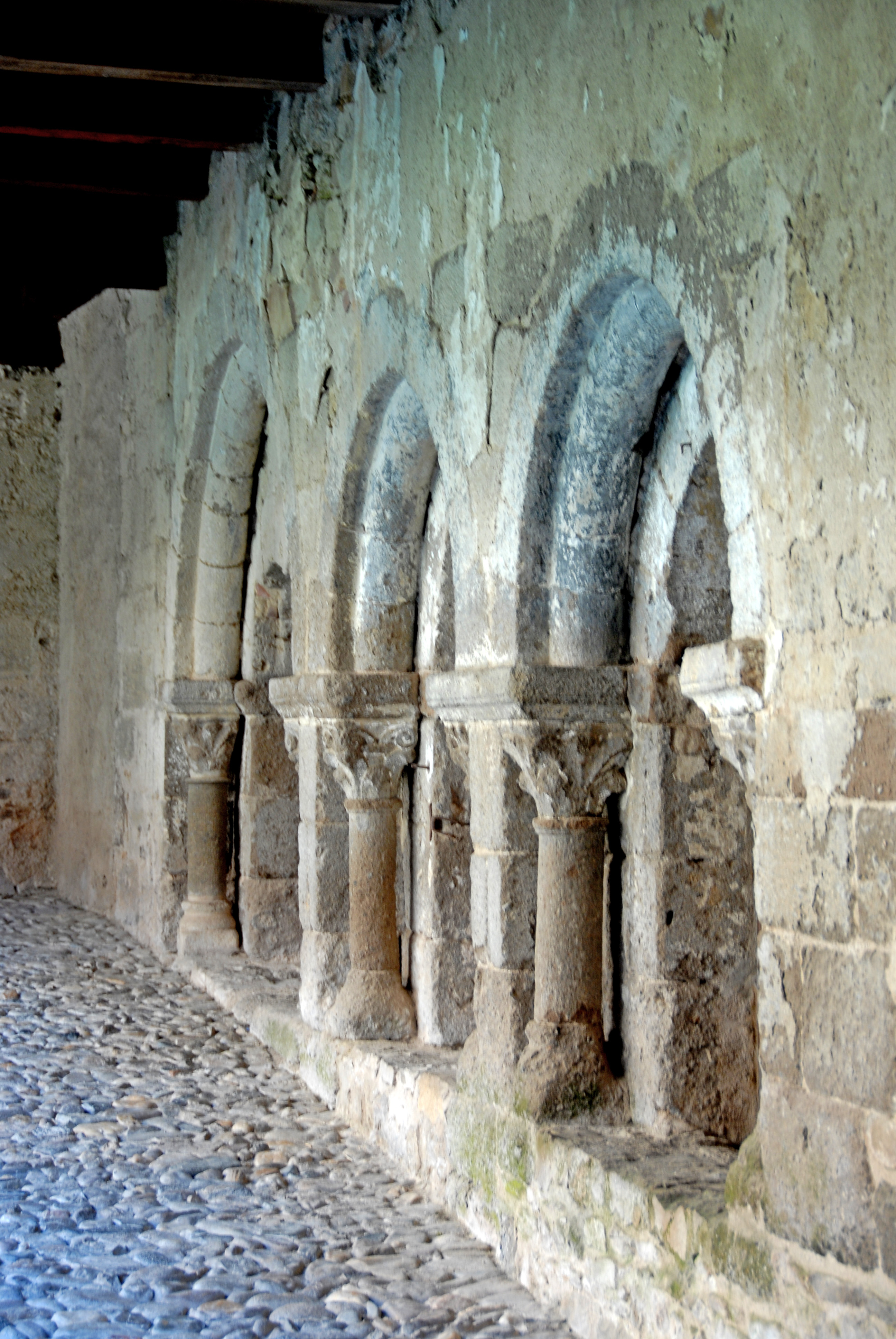 Abtei St.-André Lavaudieu, Kreuzgang, Ostgalerie, Öffnungen zum Kapitelsaal